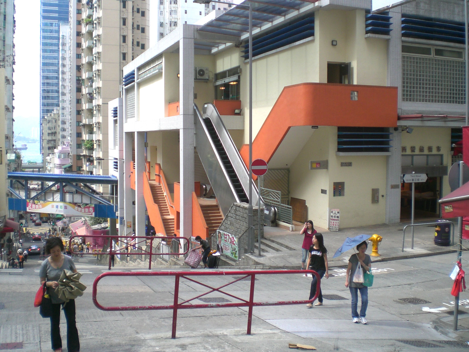 正街與第二街交界, 西營盤街市